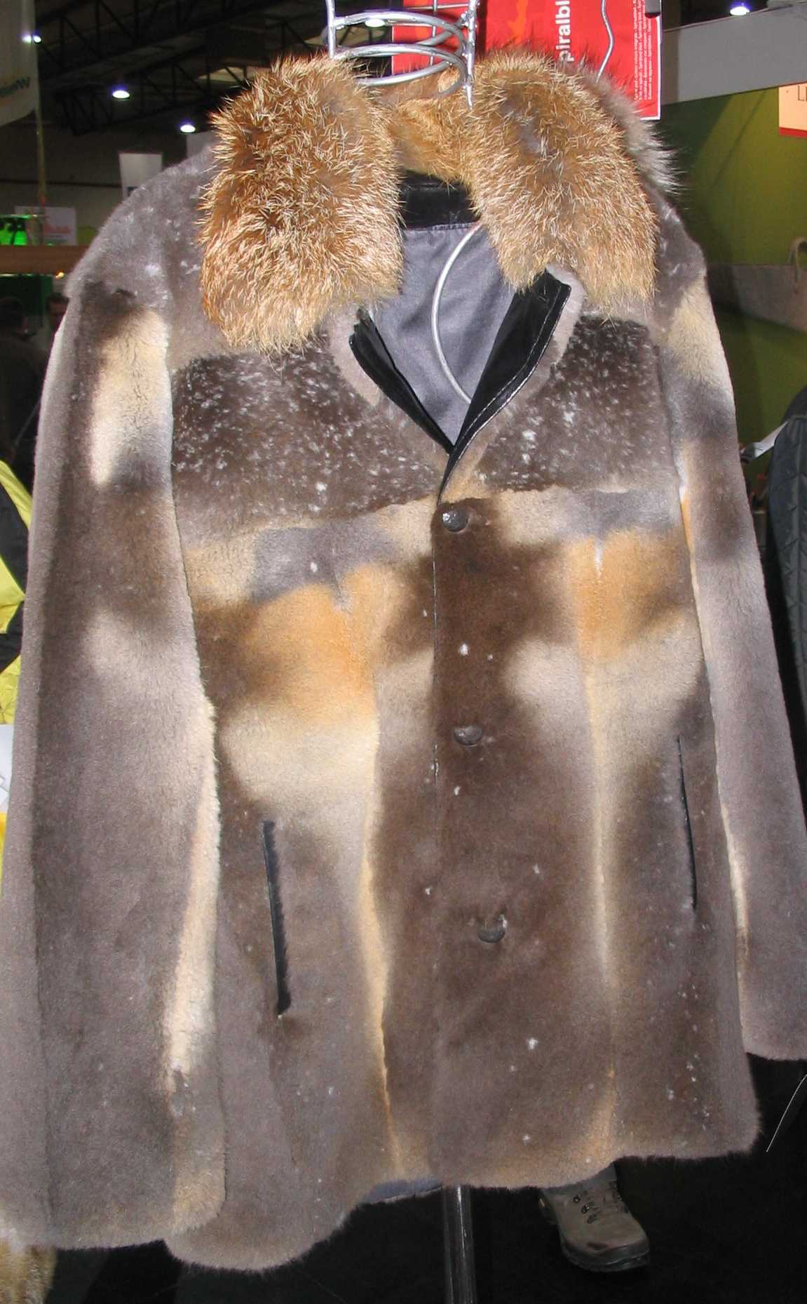 Kurzmantel aus geschorenem Rotfuchsfell mit naturbelassenem Rotfuchskragen mit stark gesprenkeltem Unterhaar. Design und Ausführung: Guido Adrian, Köln. „Redfox-Fashion-Award“, ein Wettbewerb zur Förderung der Nutzung der anfallenden einheimischen Felle, insbesondere der Rotfuchsfelle. Teilnahmeberechtigt waren die Mitglieder des Zentralverbands des deutschen Kürschnerhandwerks und die Kürschner Österreichs, der Schweiz und der Niederlande. Sponsoring u. a. durch die Zeitschrift „Wild und Hund“, Messe „Jagd und Hund“. Anlässlich und auf der Messe „Jagd und Hund“, Dortmund Westfalenhallen, 29. Januar bis 3. Februar 2013.